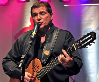 Jerry Adriani em apresentação.